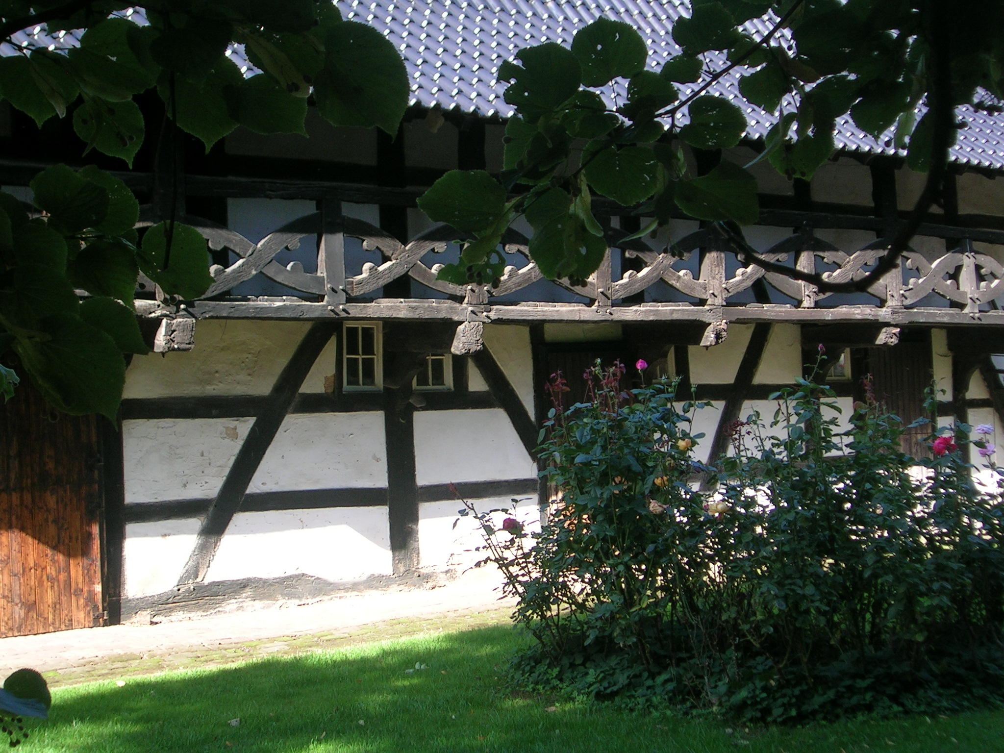 Galeriegebäude Wildenburg(Bürvenich)